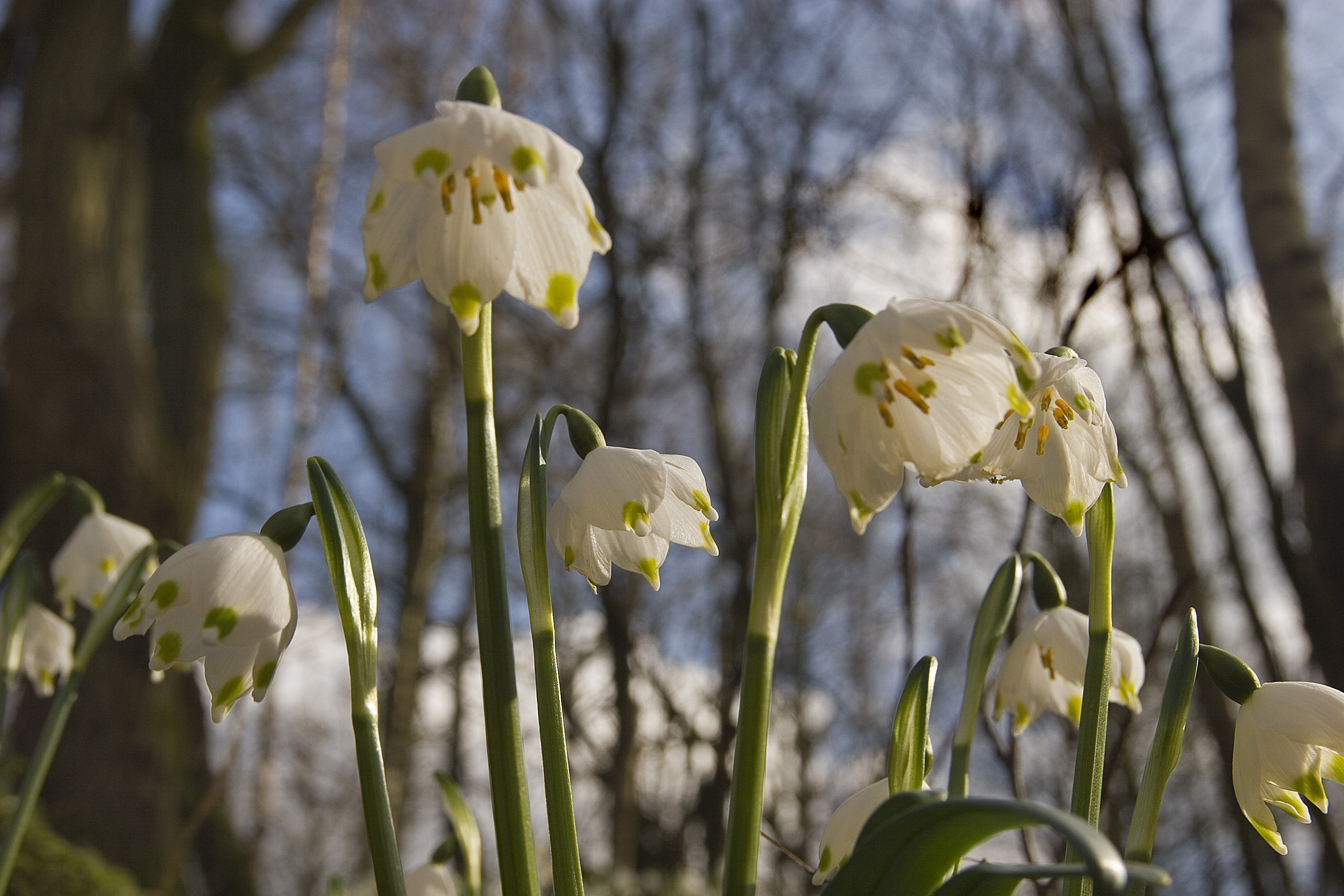 Märzenbecher im NSG Kamberg (HSK-045) in Sundern-Amecke.